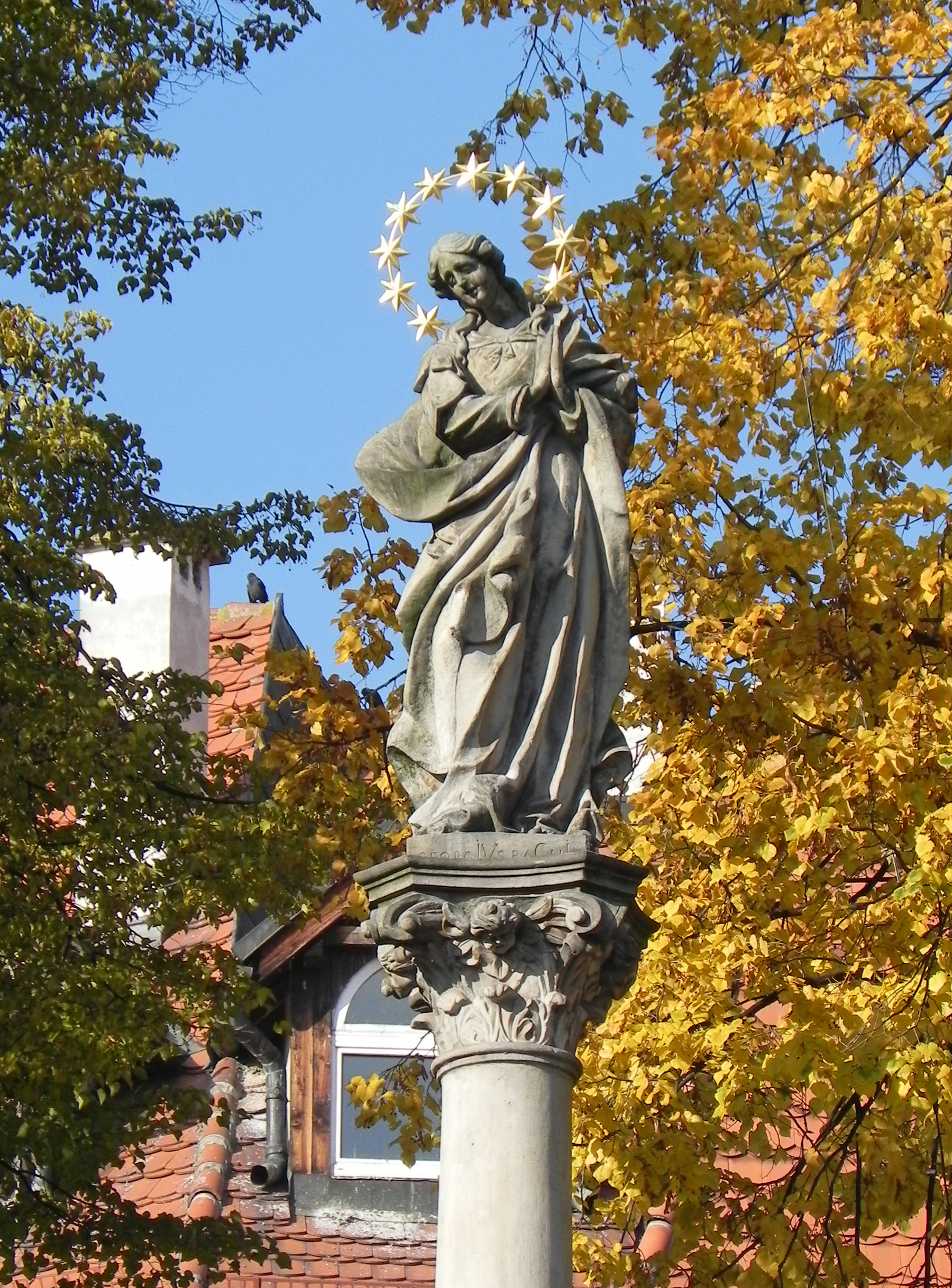 Kłodzko - kolumna z figurą Matki Boskiej, 1680 (zabytek nr 143 z 24.03.1950)